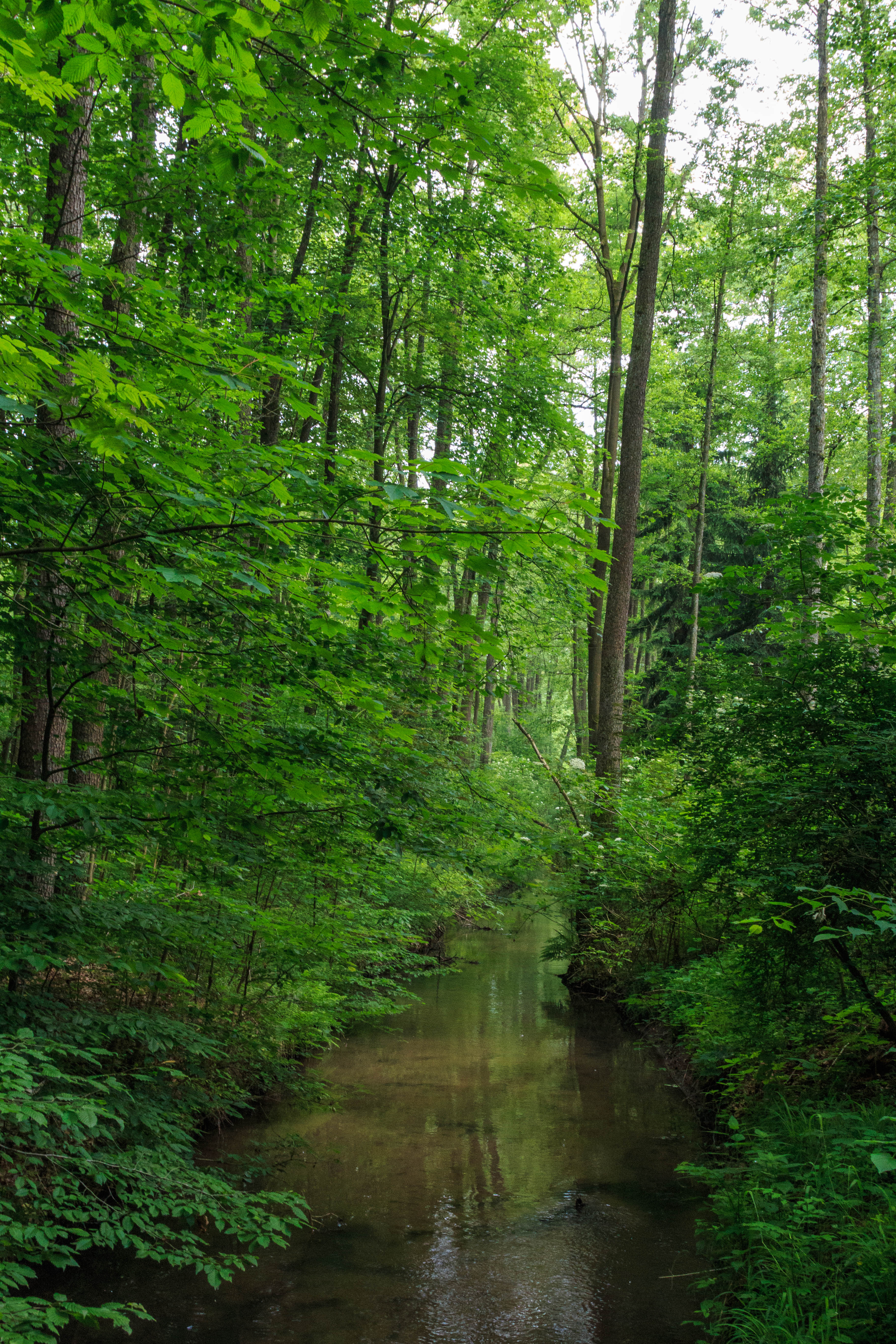 Přírodní památka Týnišťské Poorličí Project: Chráněná území.